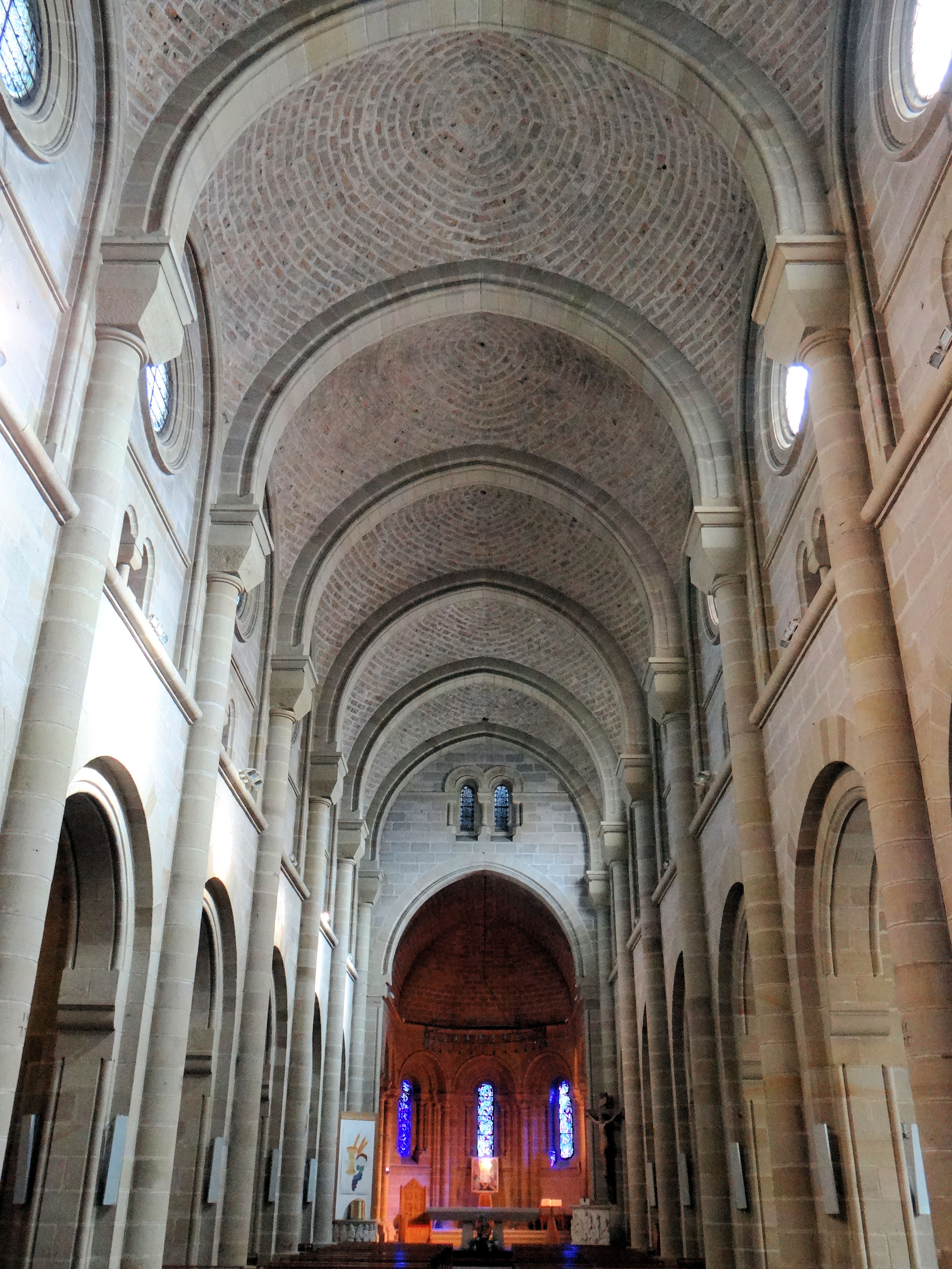 Brive-la-Gaillarde - Église Saint-Sernin - Nef